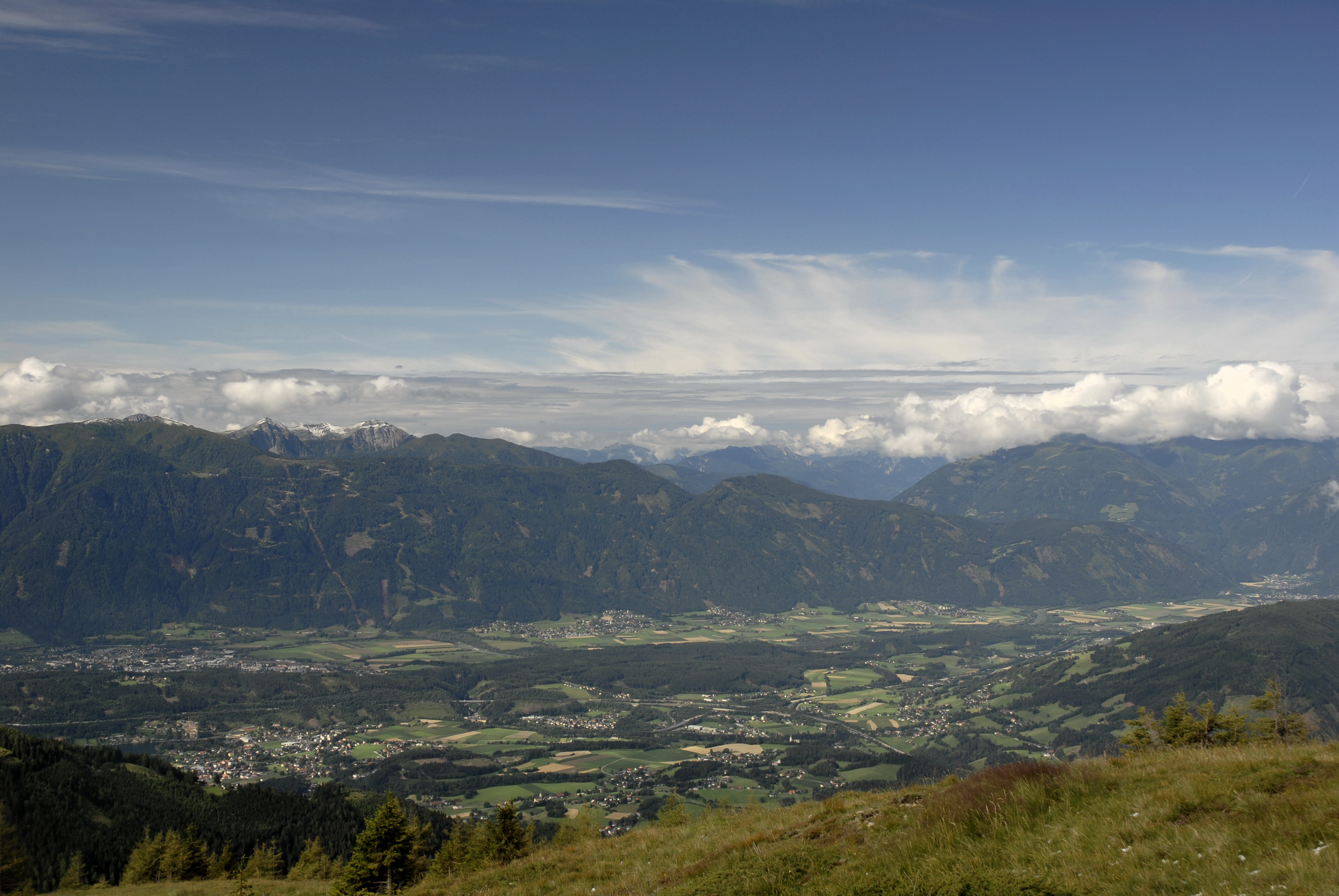 Blick vom Tschiernock auf das Lurnfeld und die Latschurgruppe